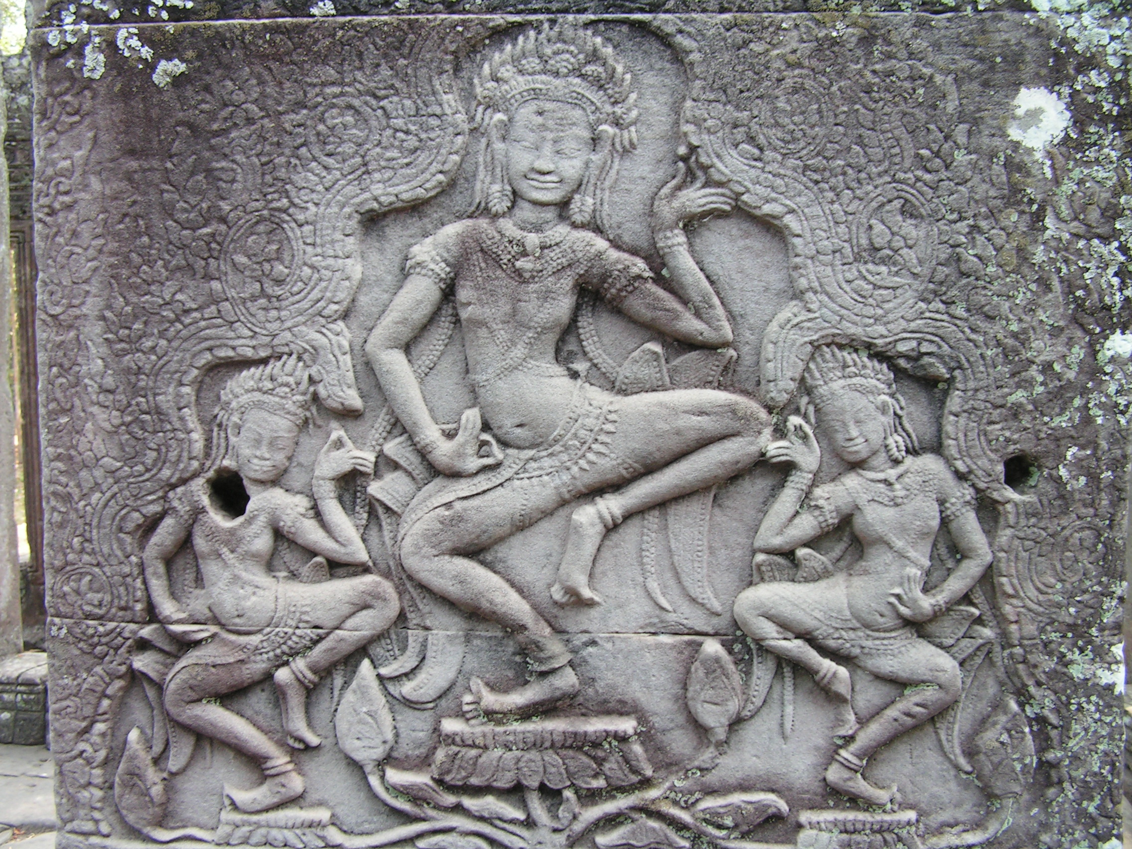 State temple Bayon at Angkor: dancing apsaras